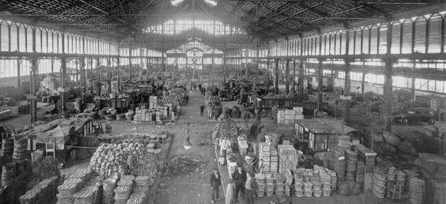 Vista del mercat del Born de Barcelona quan estava en funcionament com a mercat central de fruites i verdures.